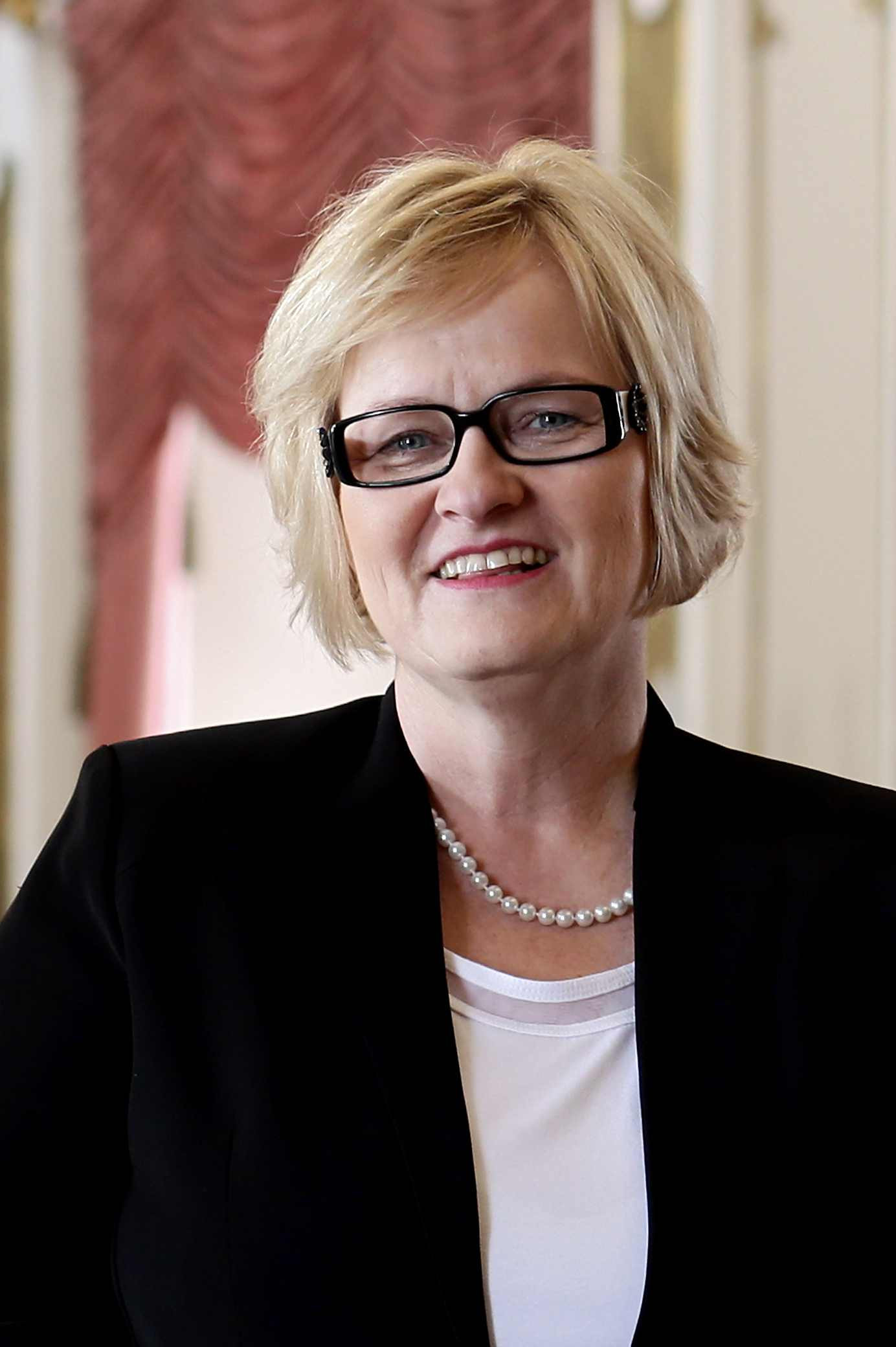 Gerda Weichsler-Hauer, 2. Landtagspräsidentin des Oberösterreichischen Landtags